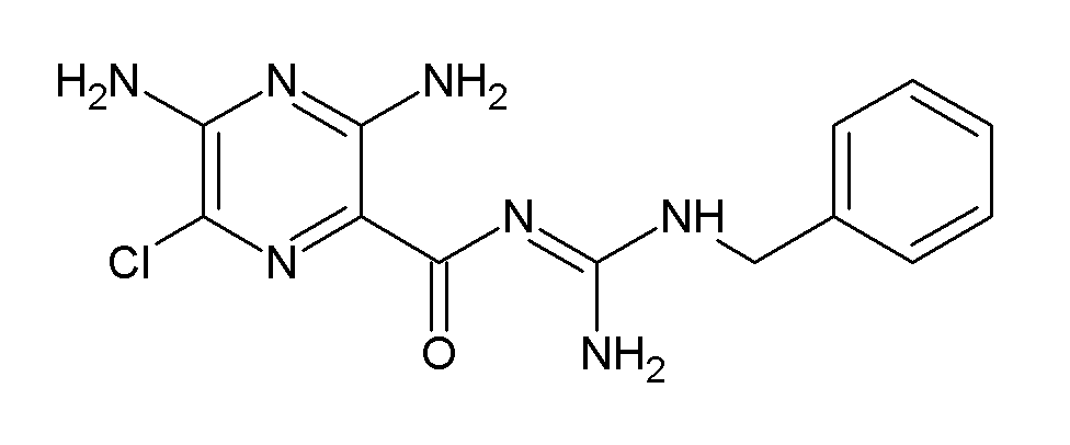 Benzamil